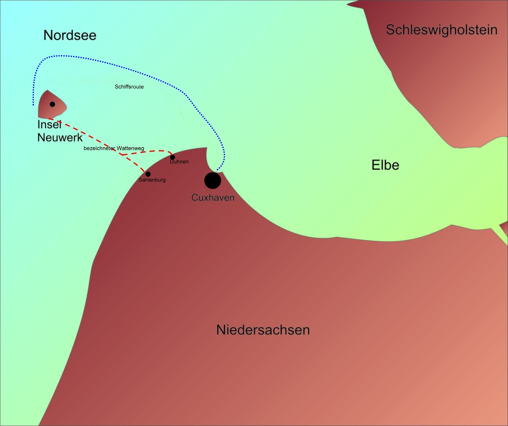 Elbmündung mit Neuwerk.